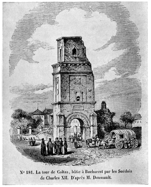 Turnul Colţei